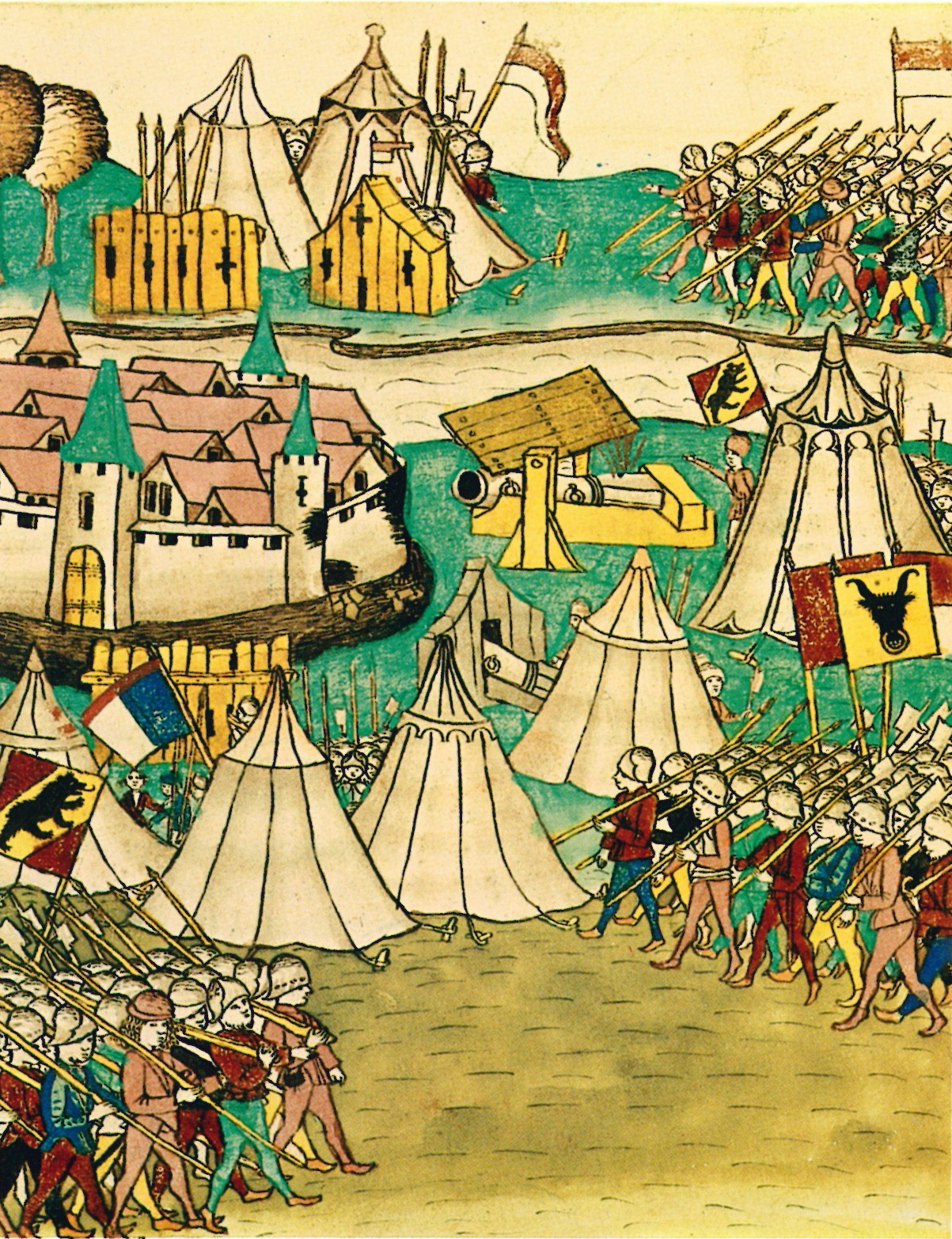 Waldshuterkrieg Ankunft der verstärkten Berner Truppen vor der belagerten Stadt Waldhsut